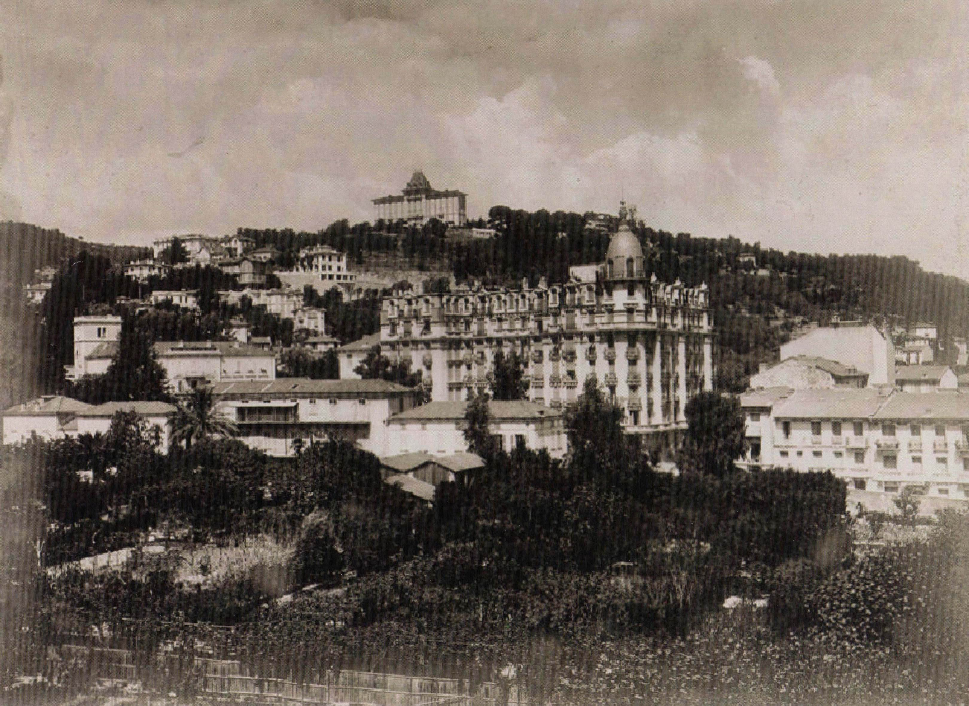 Le Palais du Dôme au 12 avenue de Pessicart et perché sur la colline le Righi Palace en 1924.